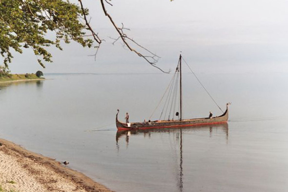 Vikingeskibet Imme Gram af Tønder Skibslag